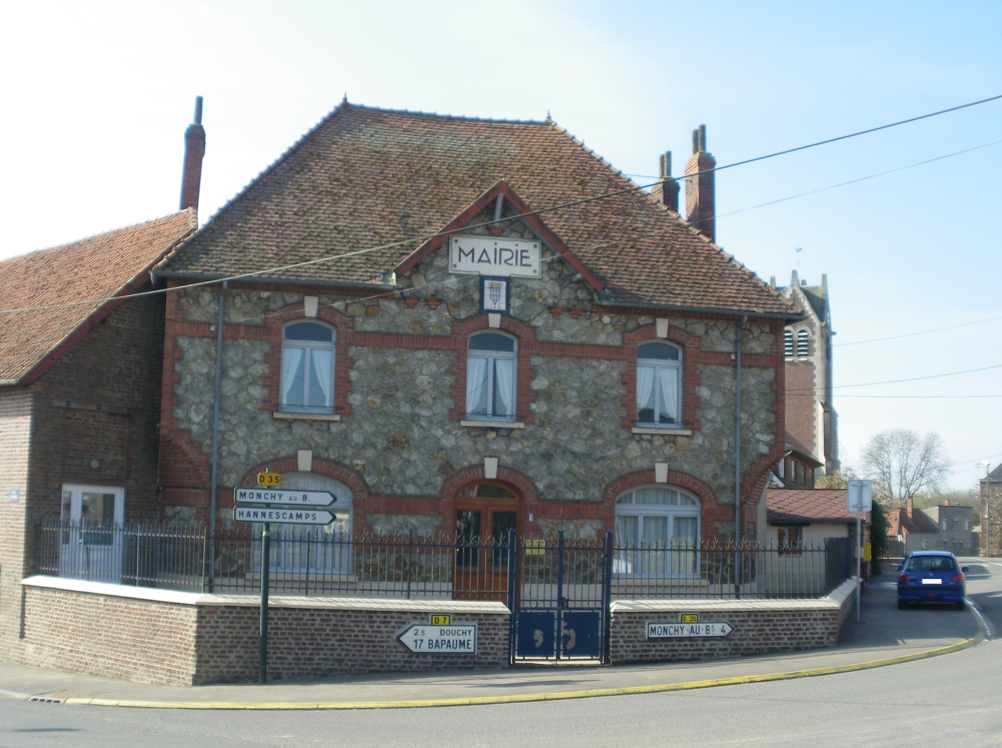 Vue de la mairie d'Adinfer.